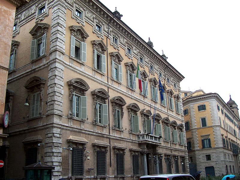 Roma - Palazzo Madama